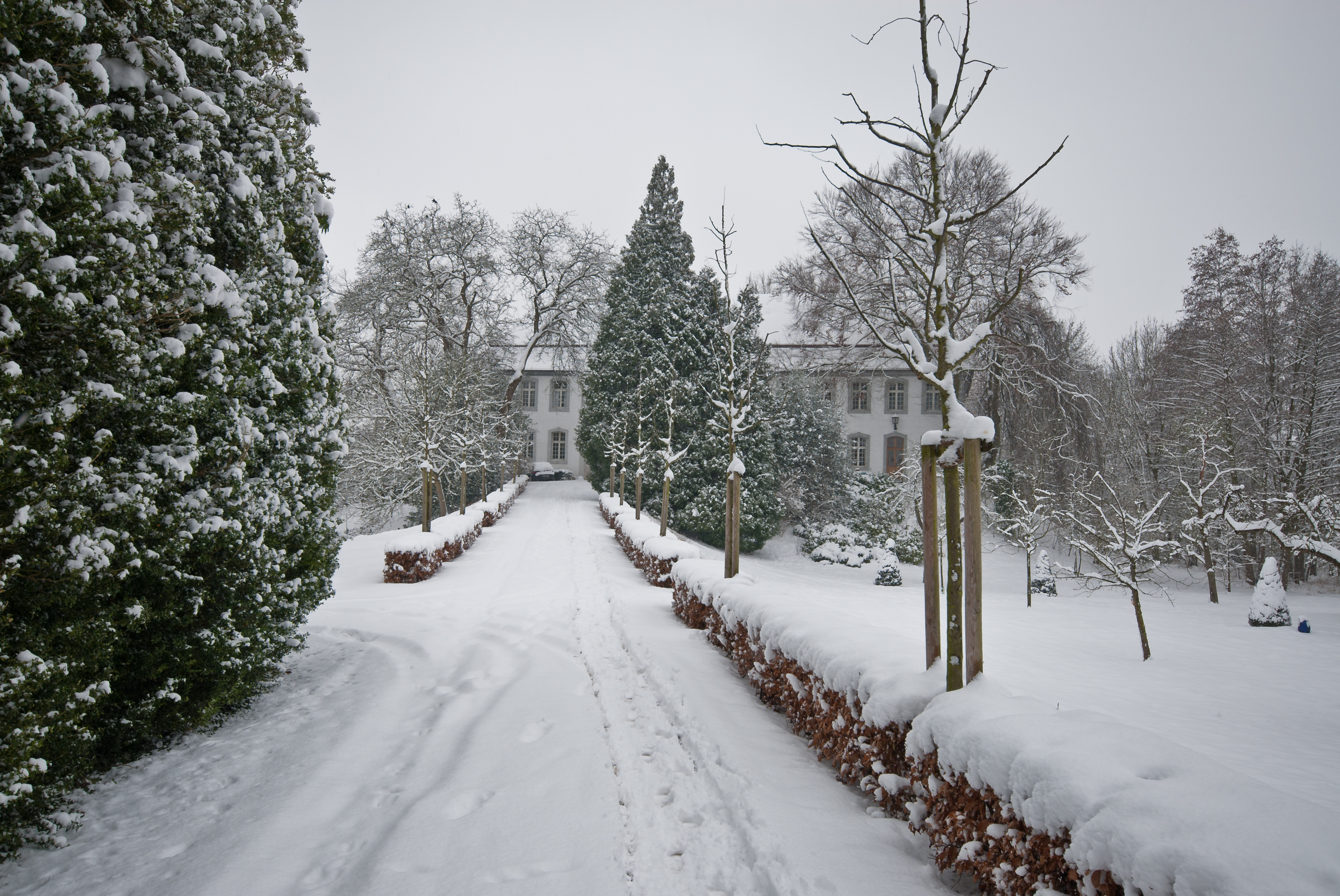 Ansicht der Burg Randerath vom Marktplatz aus gesehen